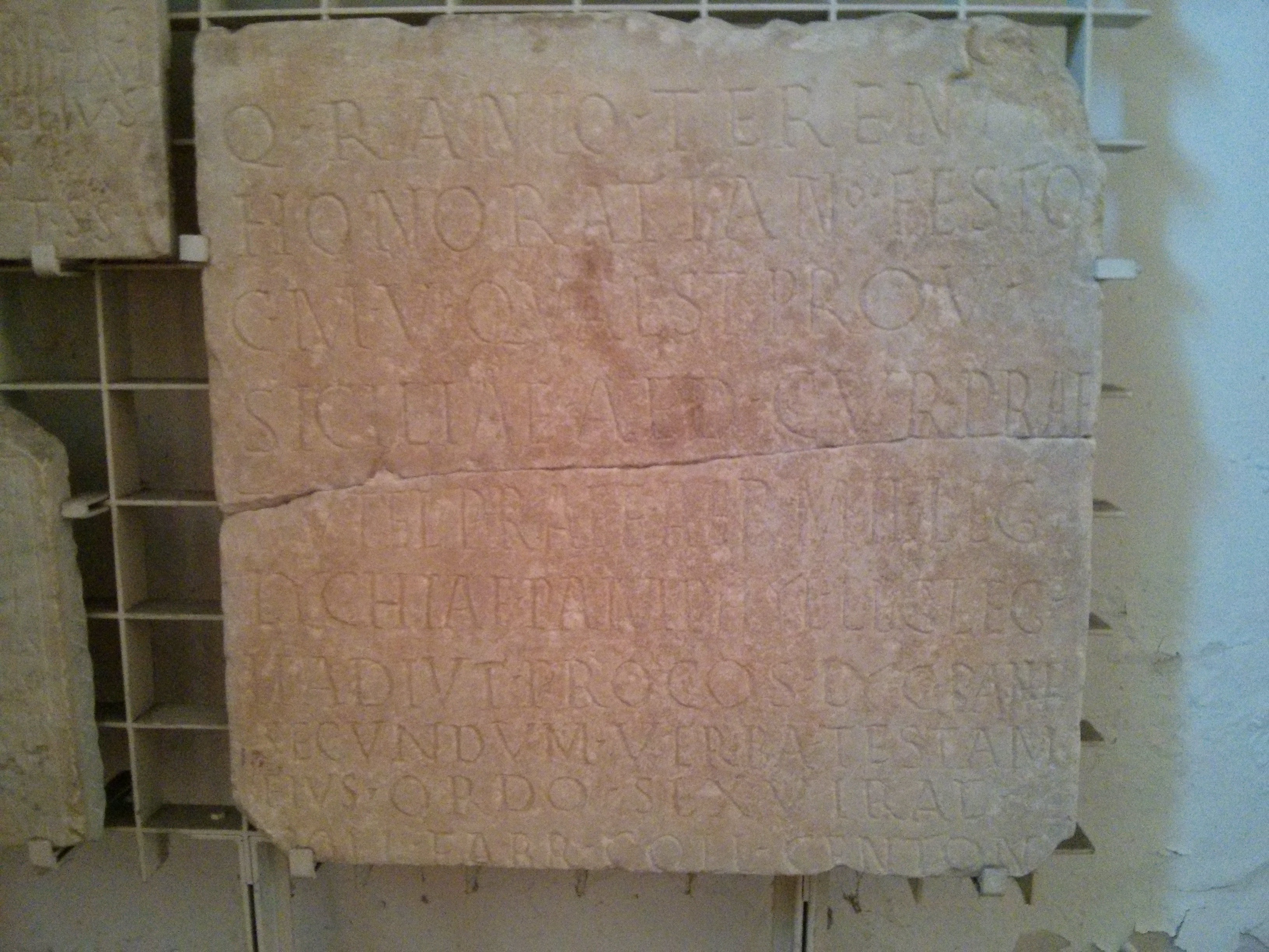 Iscrizione di Quinto Ranio Terentio Honoratiano Festo, da Suasa, conservata al Lapidario del Palazzo Ducale di Urbino (CIL XI, 6164 = SupIt-18-S, pp. 341-342 = EDR 016324)